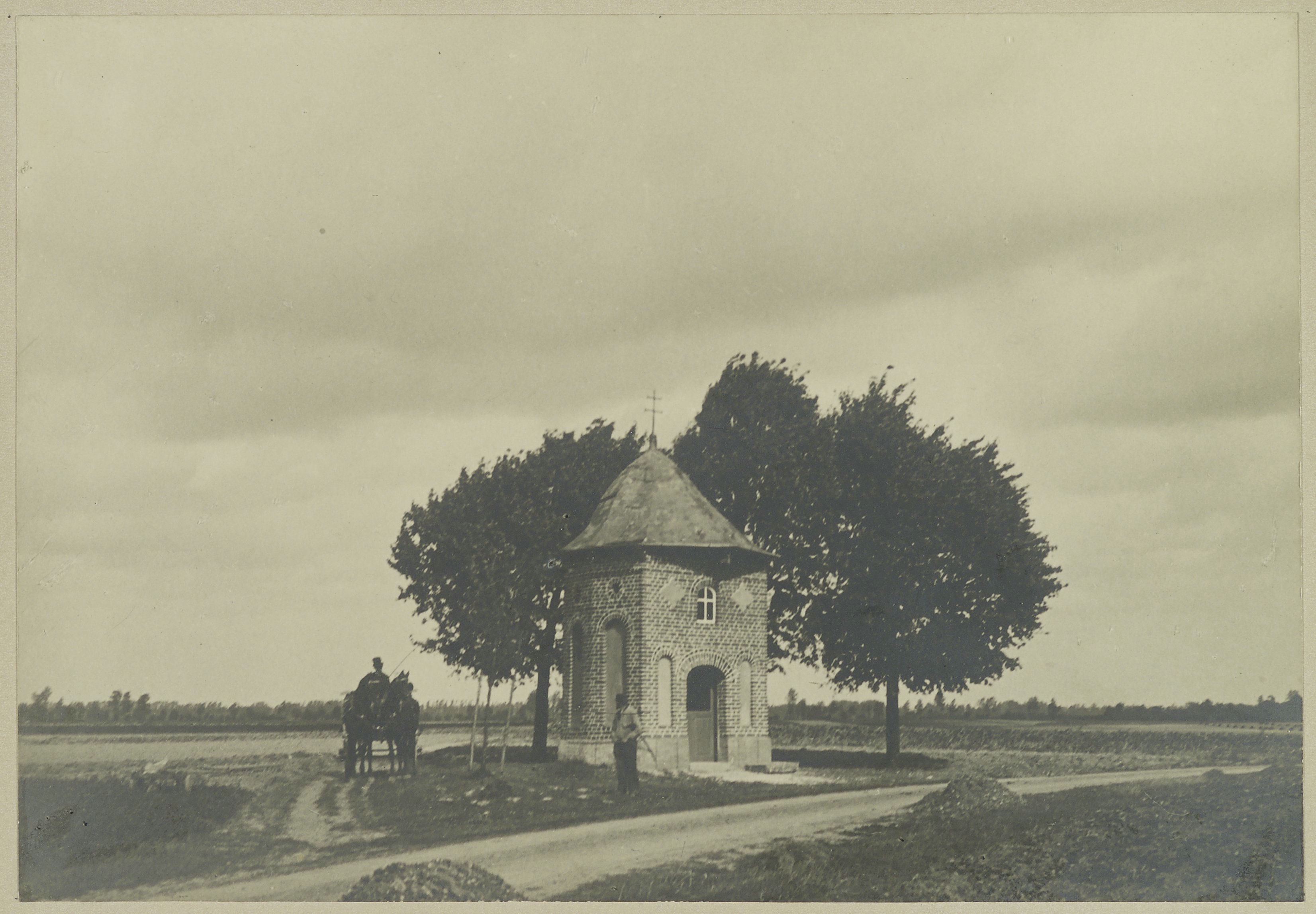 Sint Hubertuskapel: Voorgevel en zijgevel links in landschap (opmerking: Links een wagen met paarden)